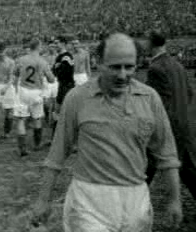 Bertus de Harder. Vriendschappelijke voetbalwedstrijd Nederland - België 1-0 (rust 1-0) in het Olympisch Stadion in Amsterdam.